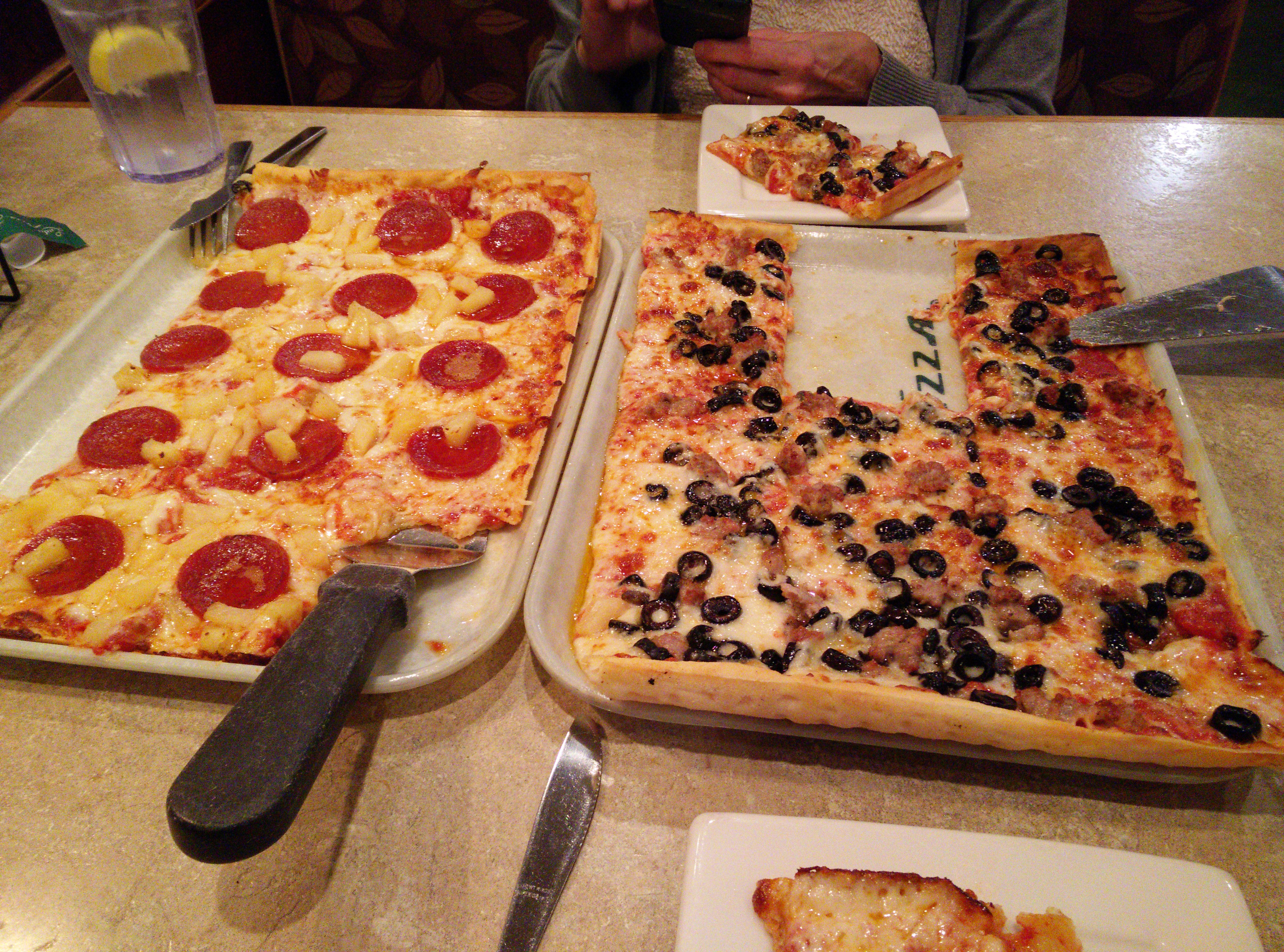 Ledo's pizza